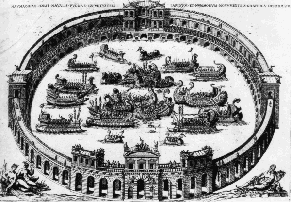 Naumachia